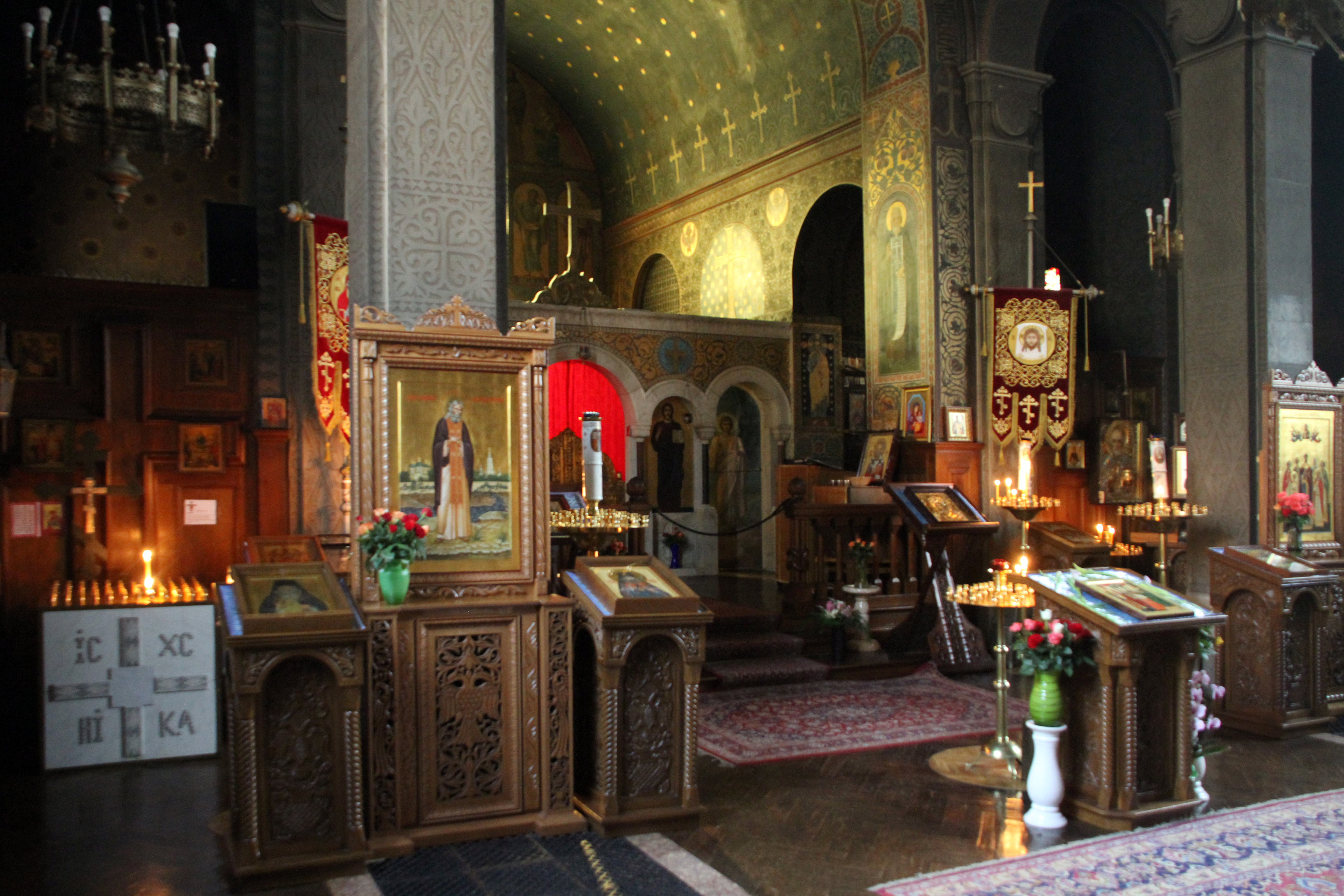 Russische Kirche Baden-Baden